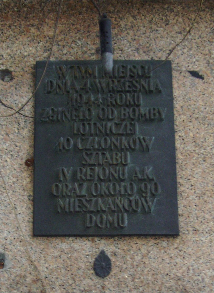 Przy ul. Szpitalnej 4 w Warszawie (fot Zu)